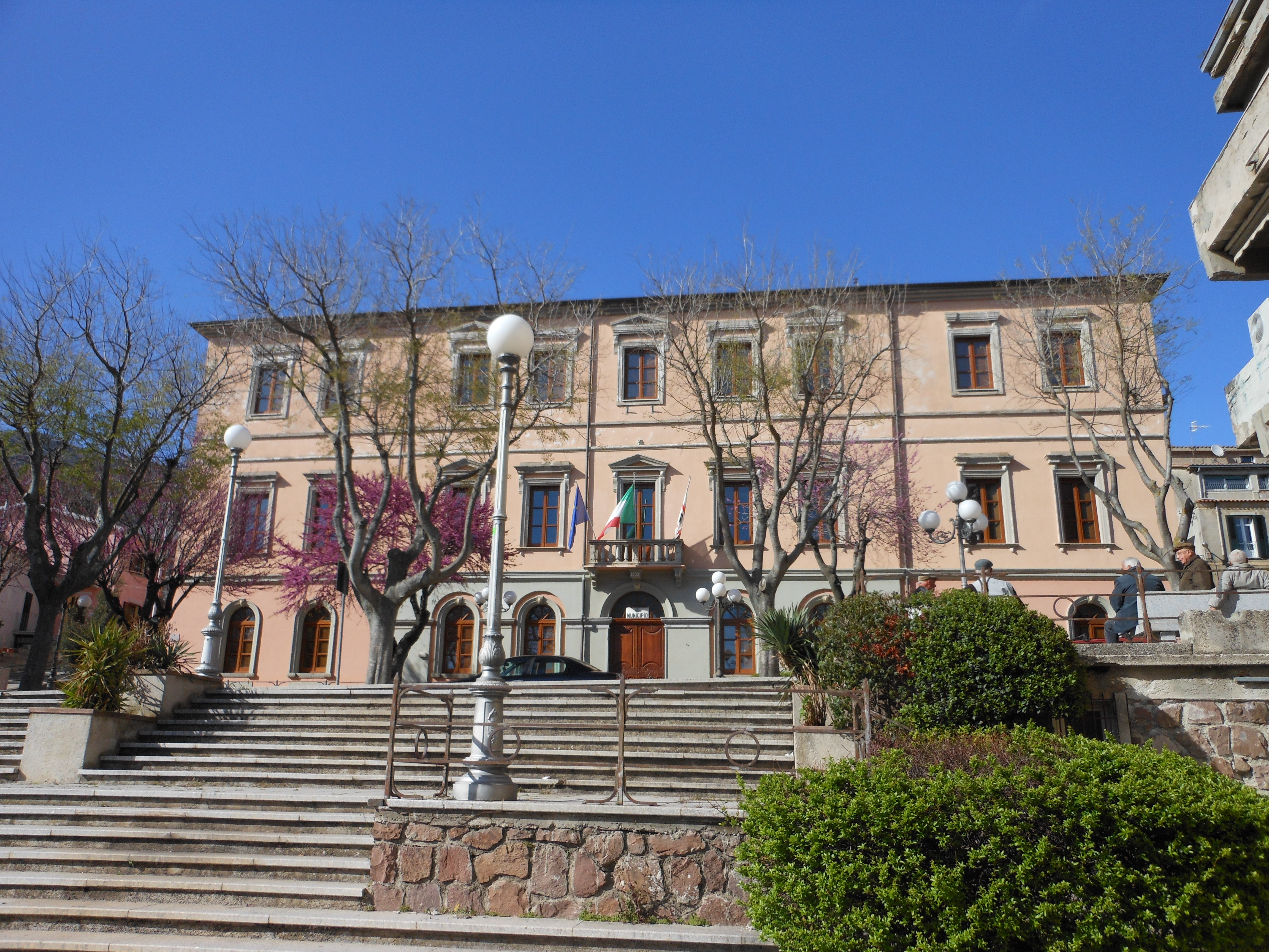 Bono - Municipio